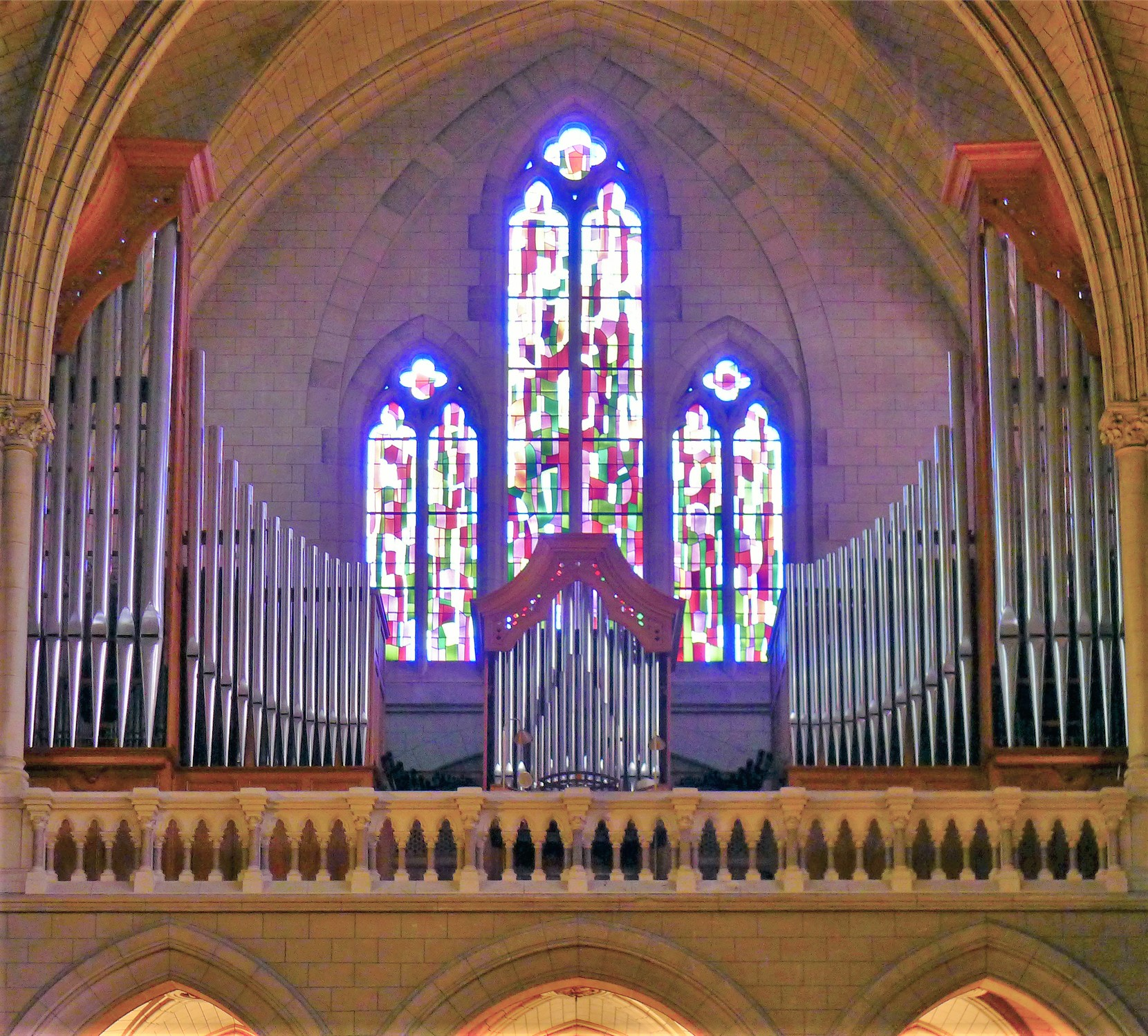 Basilique ND du perpétuel secours (orgues) - Paris XI